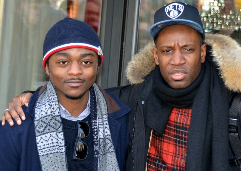 Marc Zinga et Abd al Malik au déjeuner des nommés des César du Cinéma